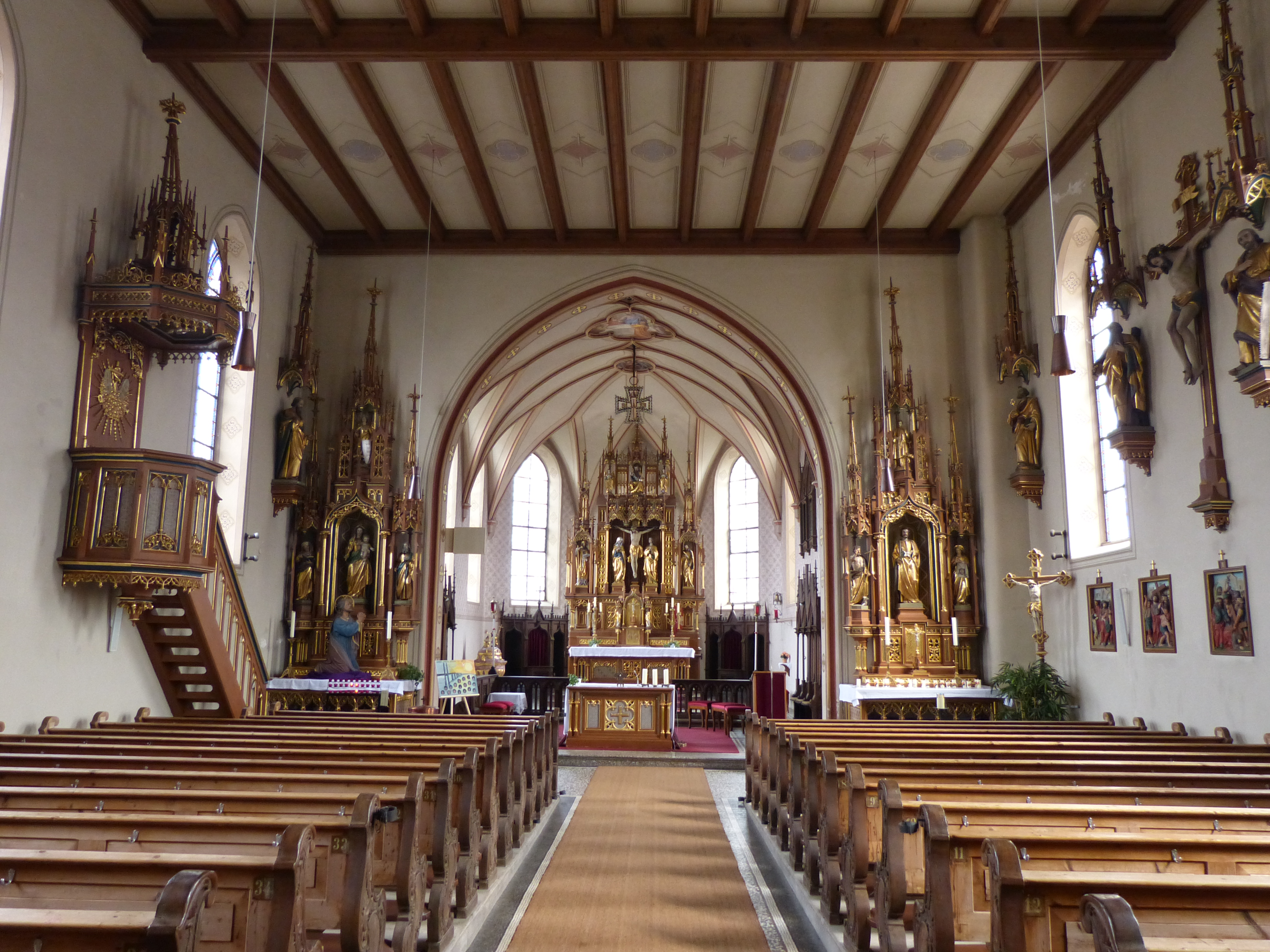 St. Bartholomäus, Gemeinde Egg an der Günz, Landkreis Unterallgäu, Bayern